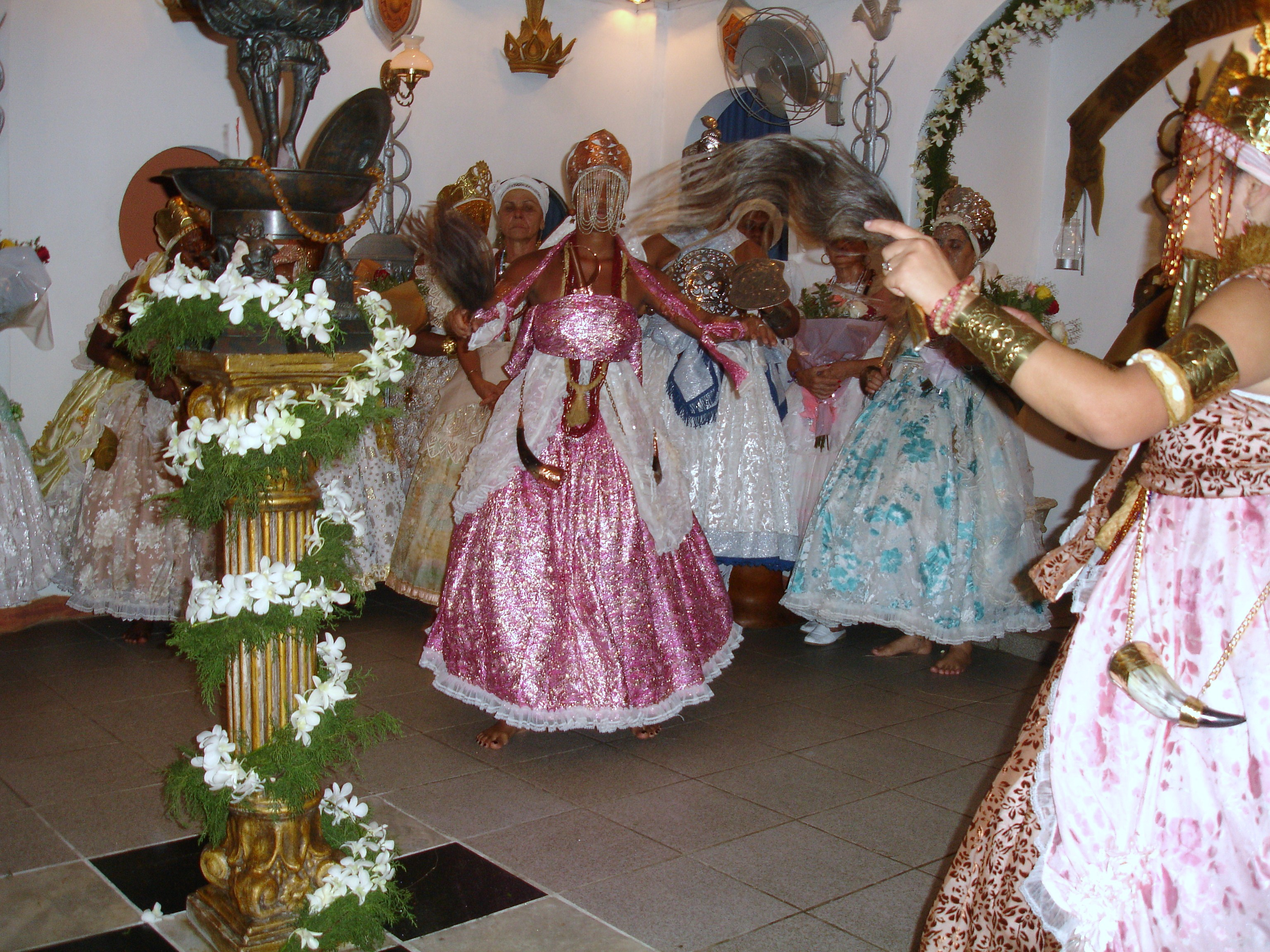 Oyá-Iansan, Oya Mensan Orum, Mãe dos nove céus, Candomblé, Salvador, Bahia